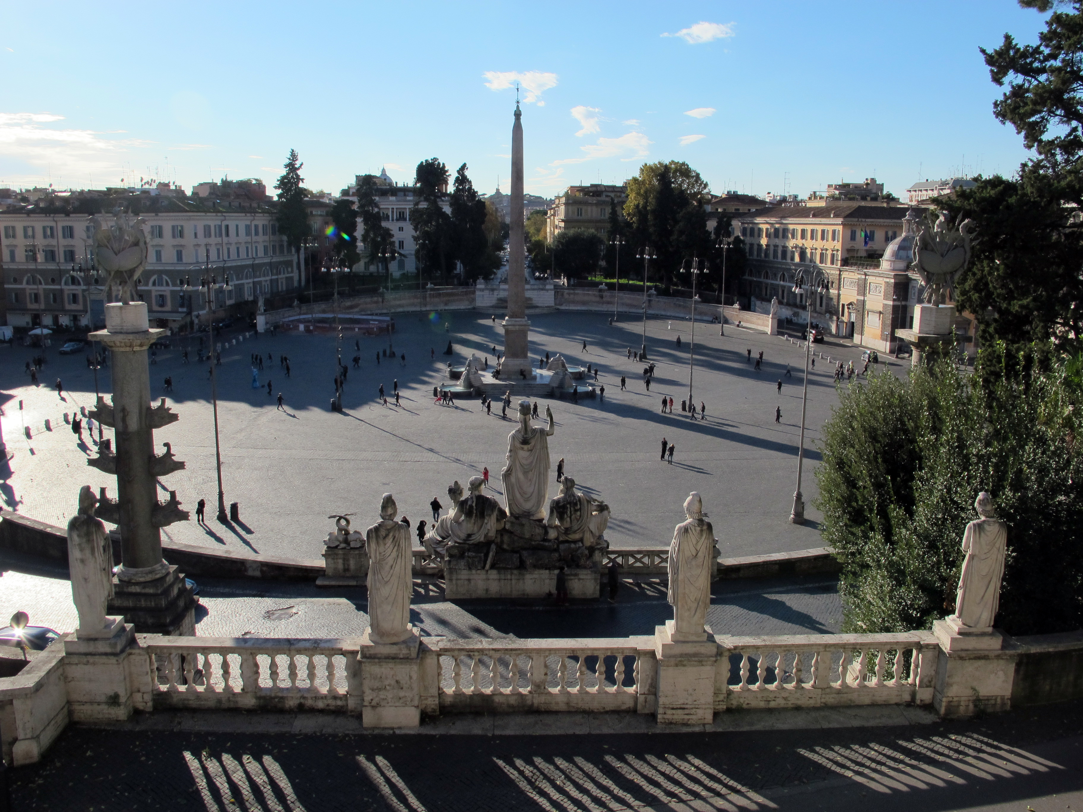 Roma, vedi titolo